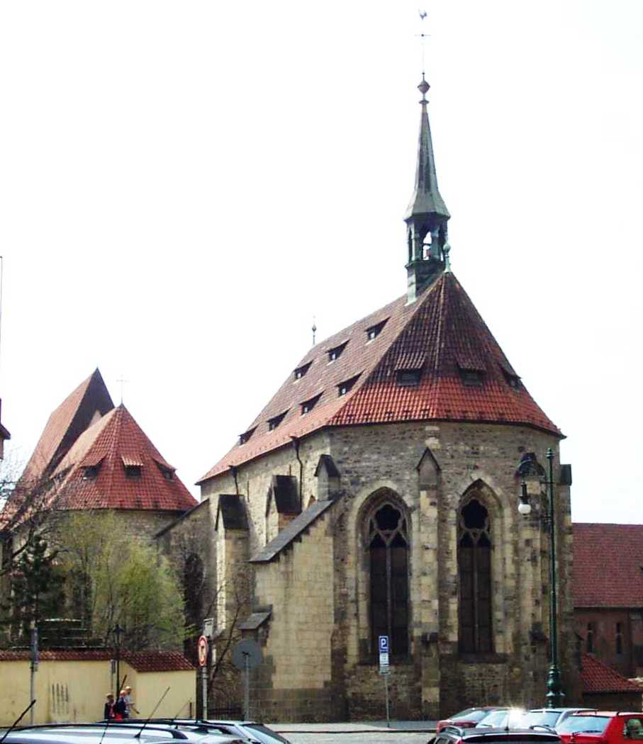 St. agnes monastery in central Prague - Anežský klášter v Praze